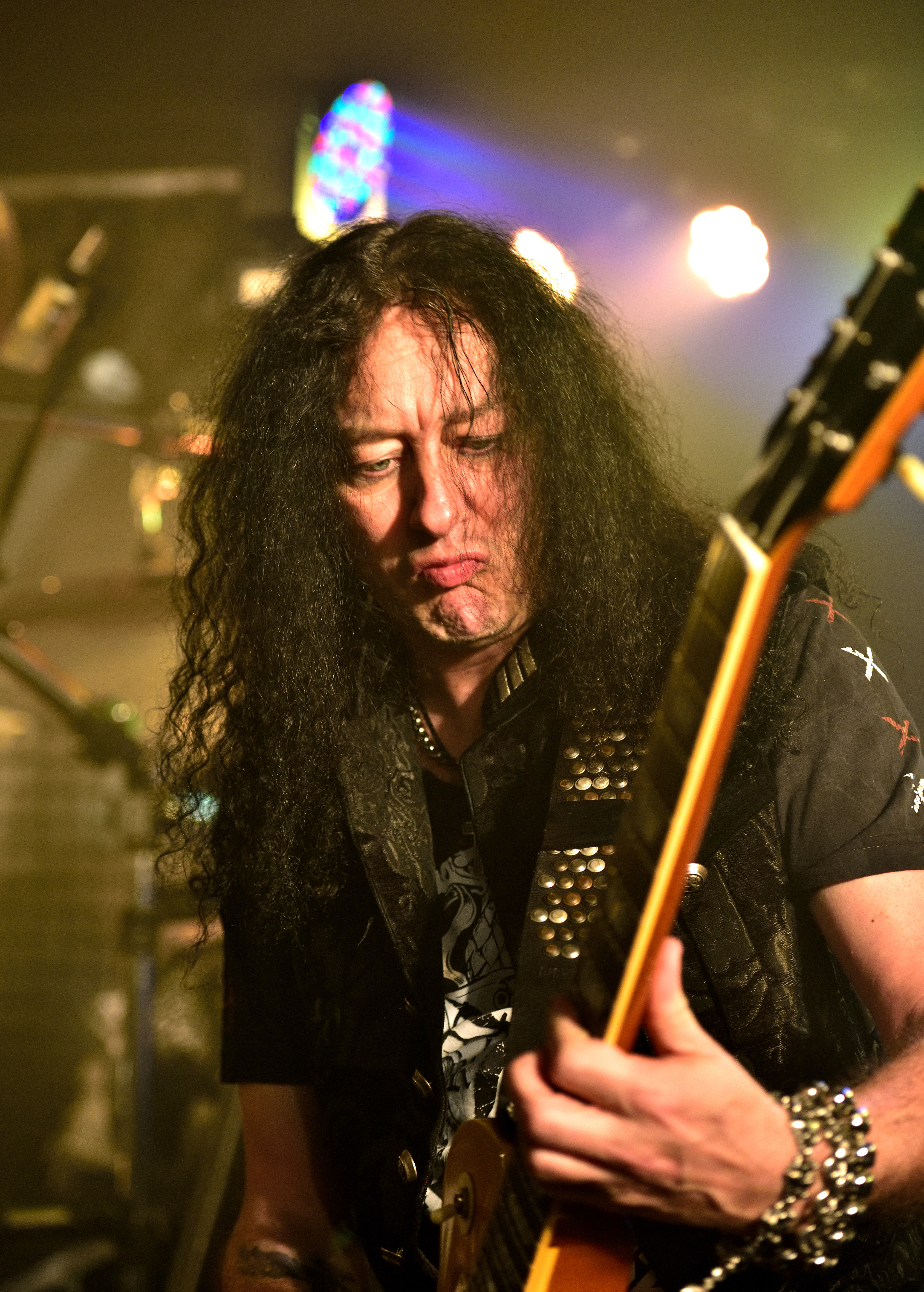 Primal Fear live im Logo Hamburg